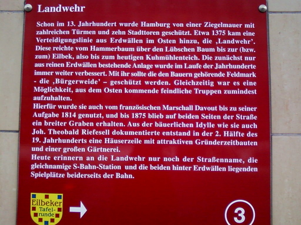 Infotafel "Eilbeker Tafelrunde" Nr. 3 - Landwehr, am Haus Landwehr Nr. 13 in Hamburg-Eilbek